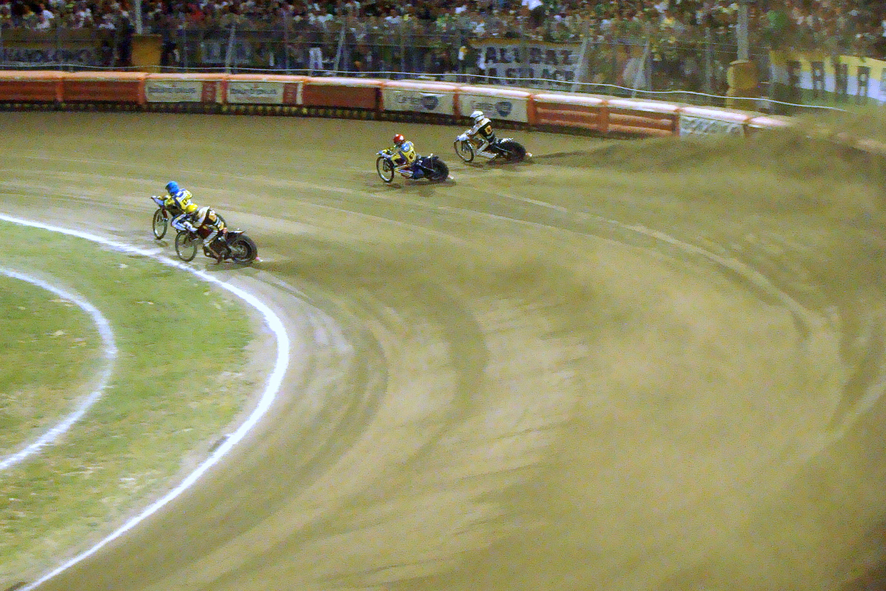 Gorzów Wlkp. - 16. 08. 2009 r. Derby nr 67. Fredrik Lindgren (kask biały), Peter Karlsson (niebieski), Grzegorz Walasek (żółty) i Tomasz Gollob (czerwony)